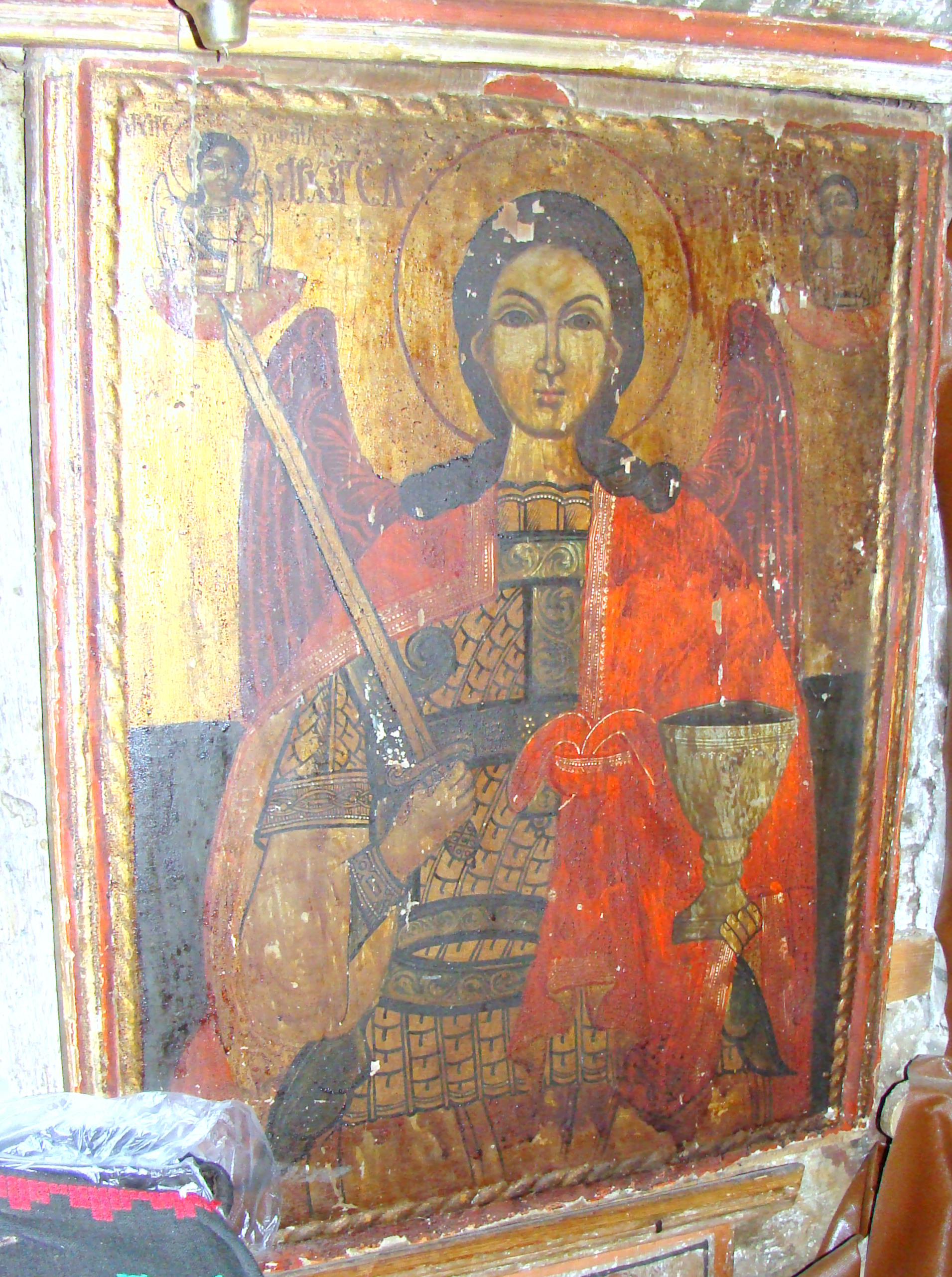 Biserica de lemn din Sălcuța